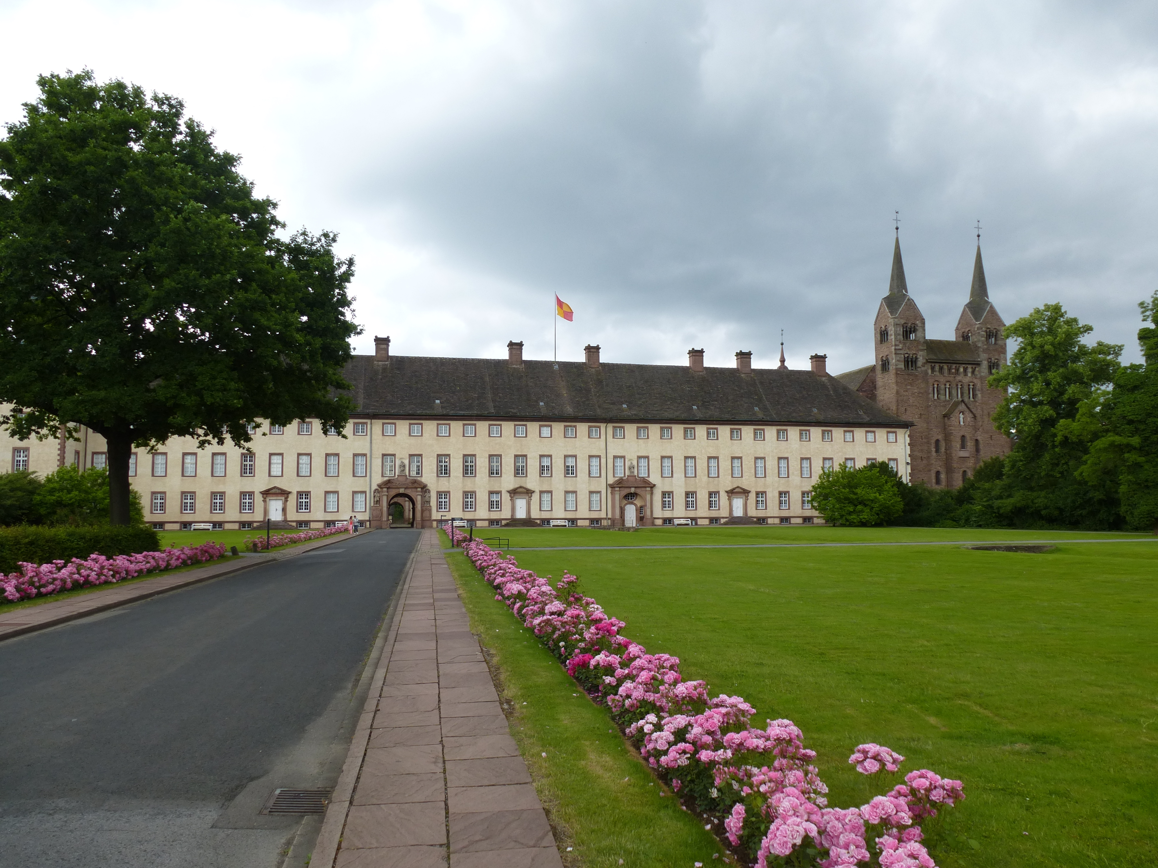 Schloß Corvey, Westanlage, Blick vom Torhaus auf das Westwerk der Kirche und des Klosters